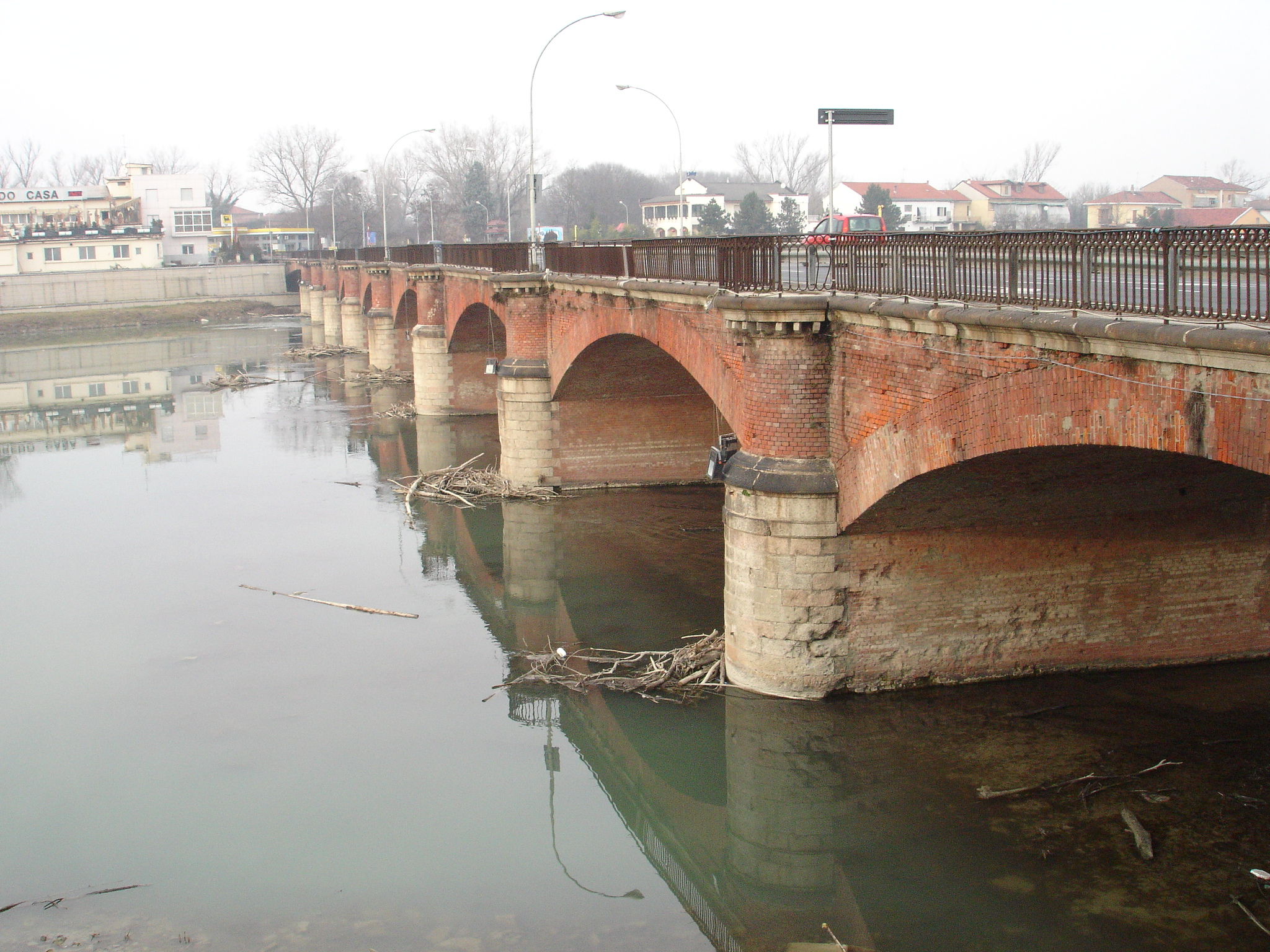 Autore della fotografia: Tony Frisina